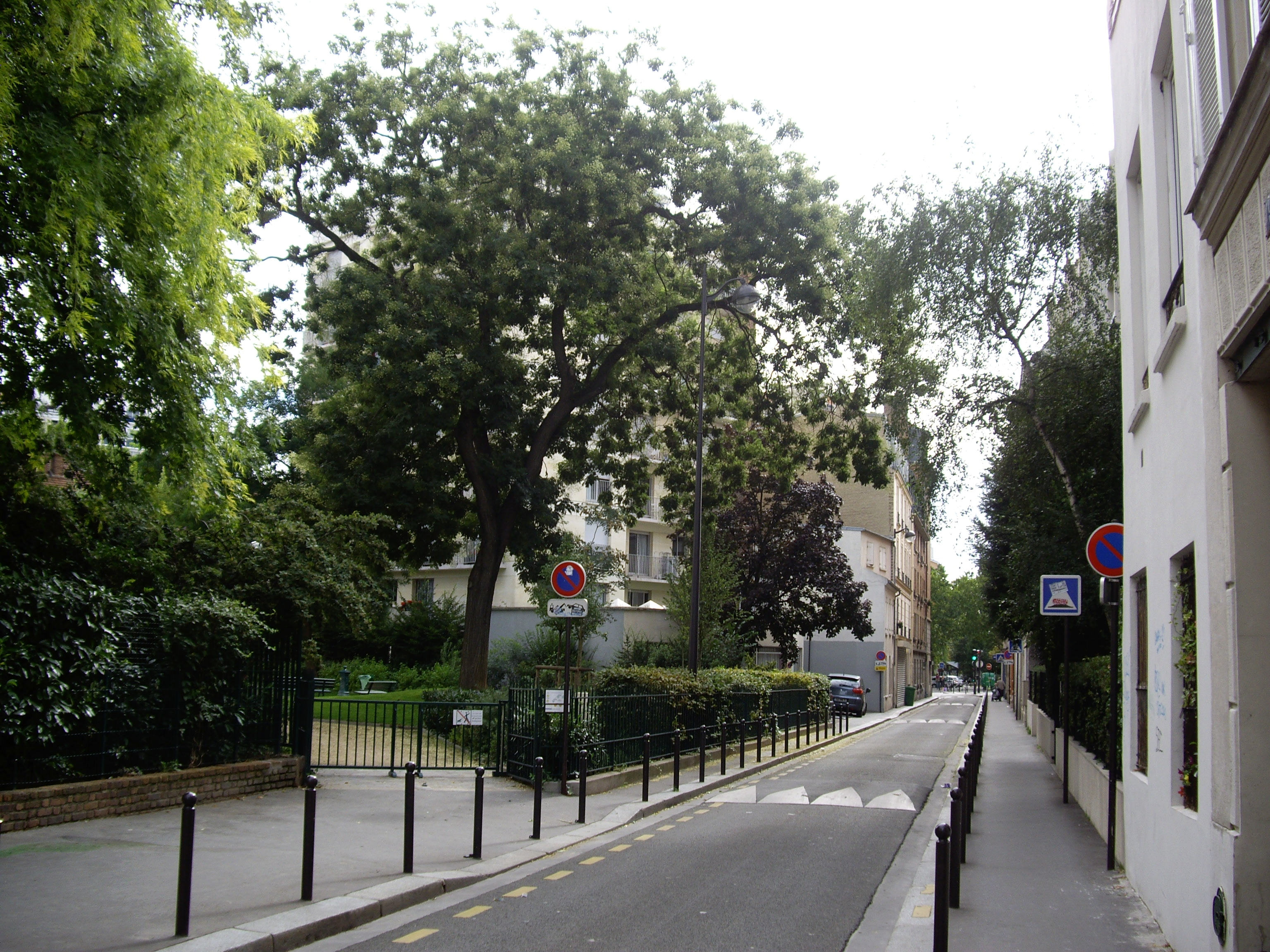 Rue des Ormeaux, Paris 20e. Vue depuis le boulevard de Charonne, vers la rue d'Avron. Sur la gauche, le square des Ormeaux.